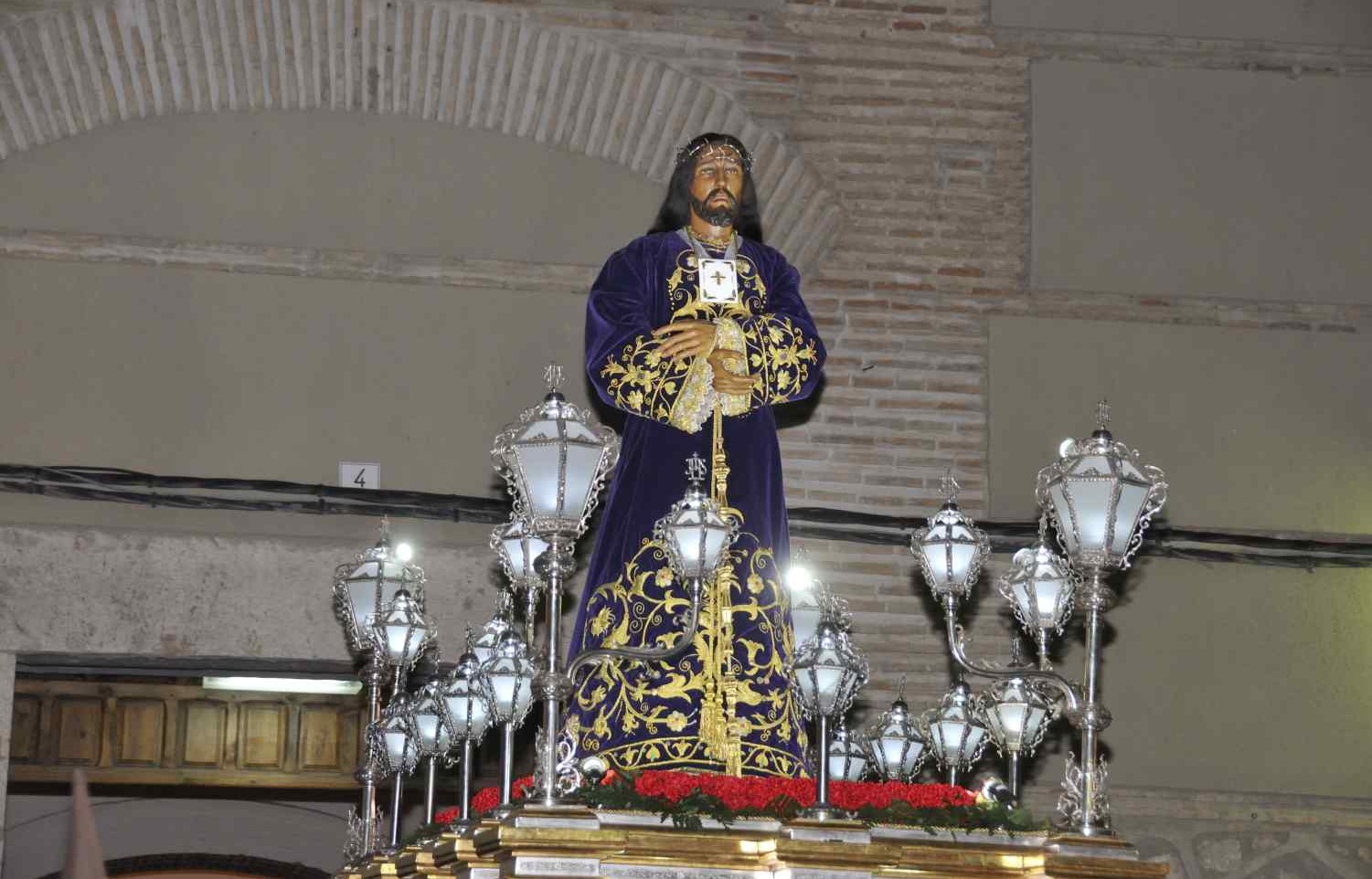 Nuestro Padre Jesús de Medinaceli de Ocaña (Toledo)